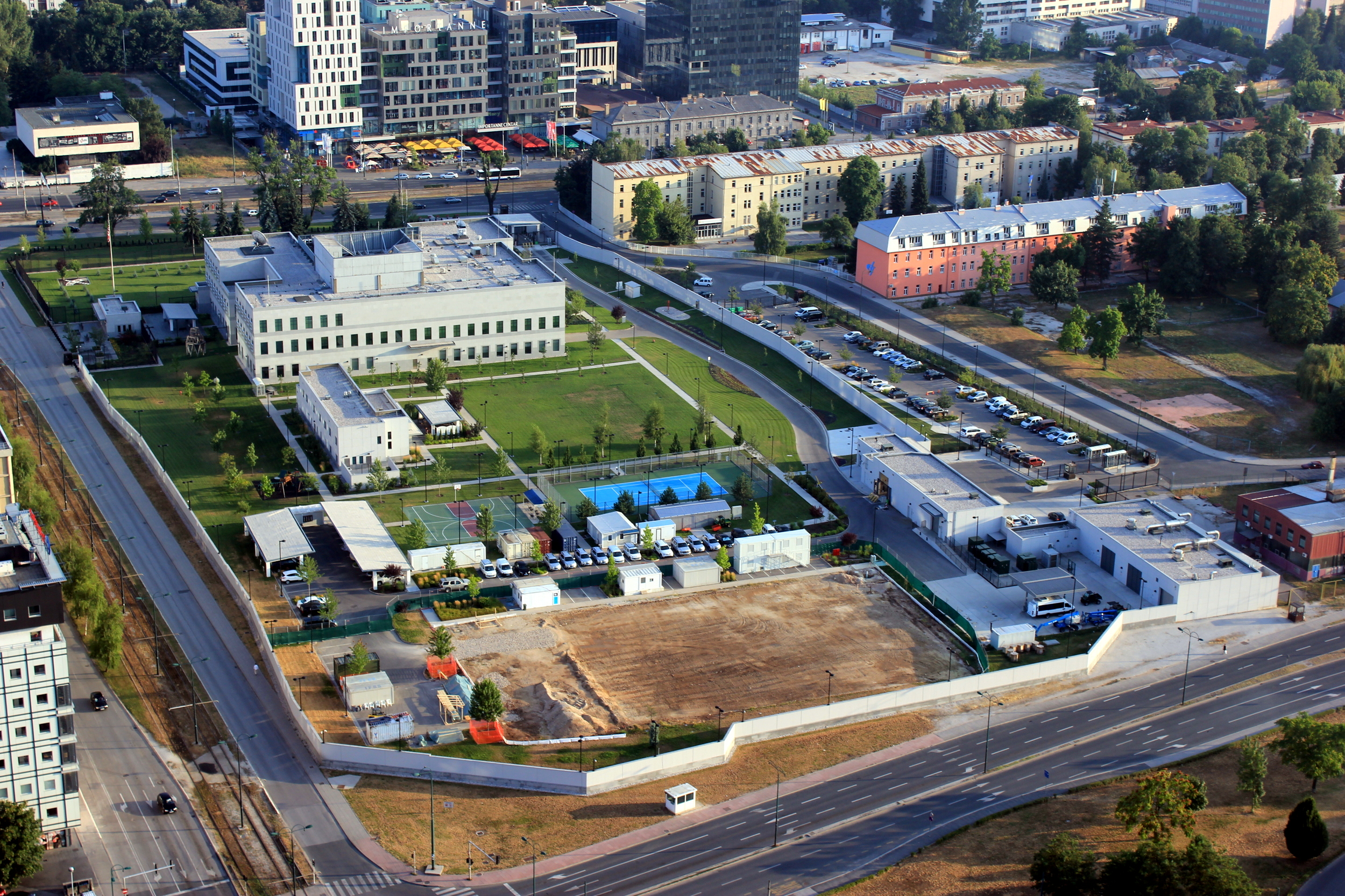 Botschaft der Vereinigten Staaten in Sarajevo.